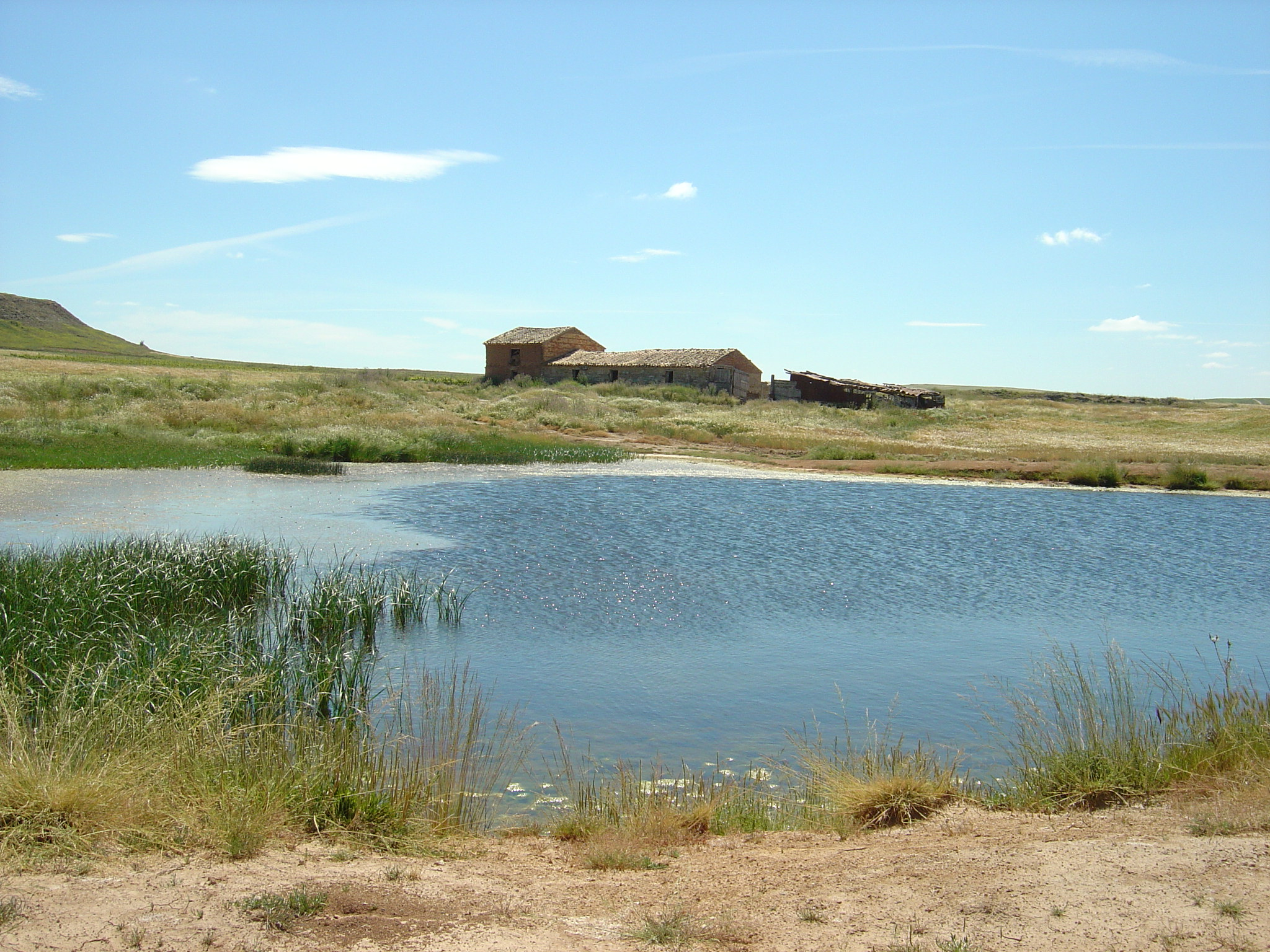 Mendavia. Navarra. Campos